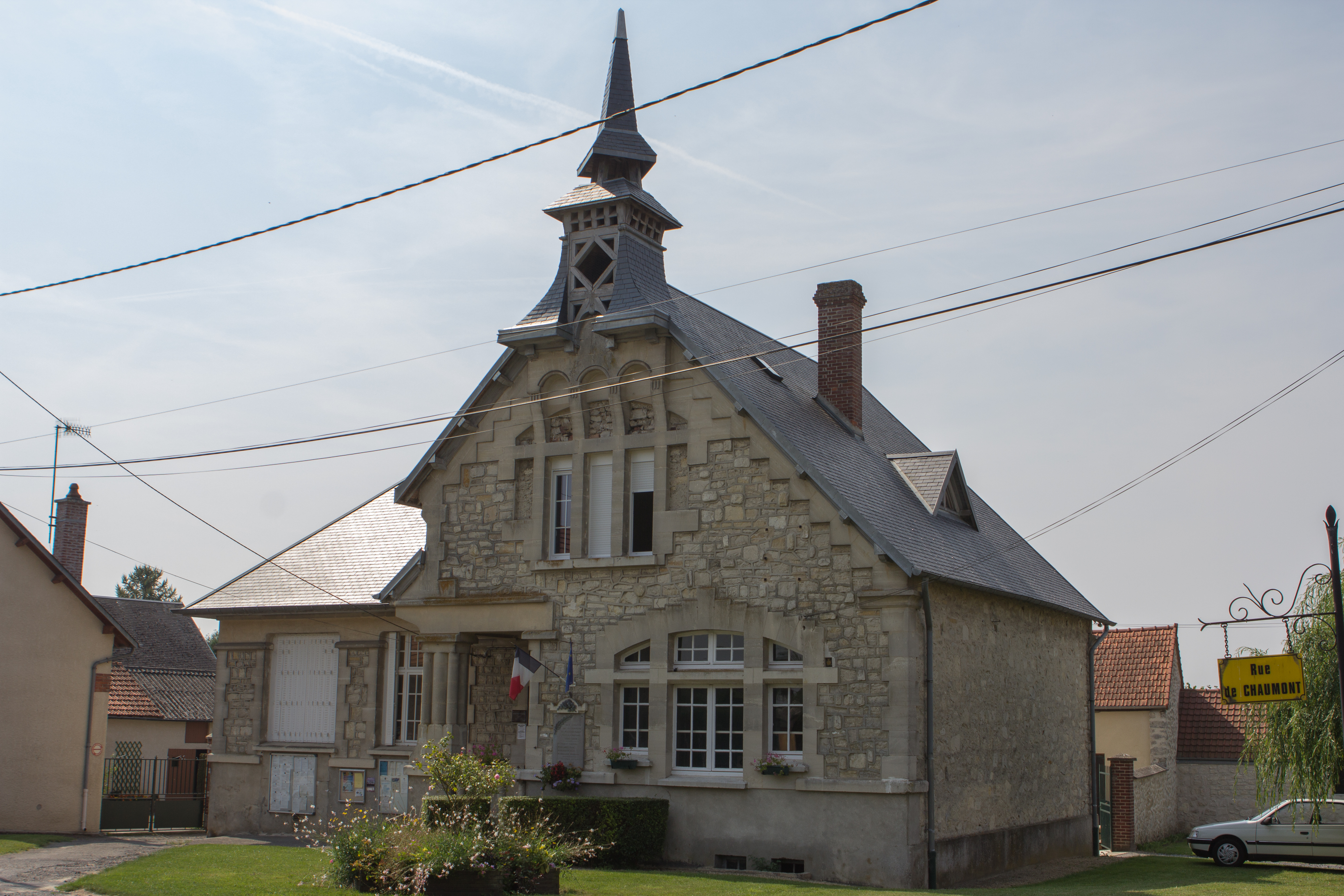 Mairie de Monthenault, Monthenault, Aisne, France